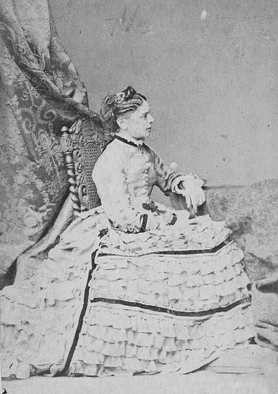 Katarzyna z Rzewuskich Radziwiłłowa (1858-1941)